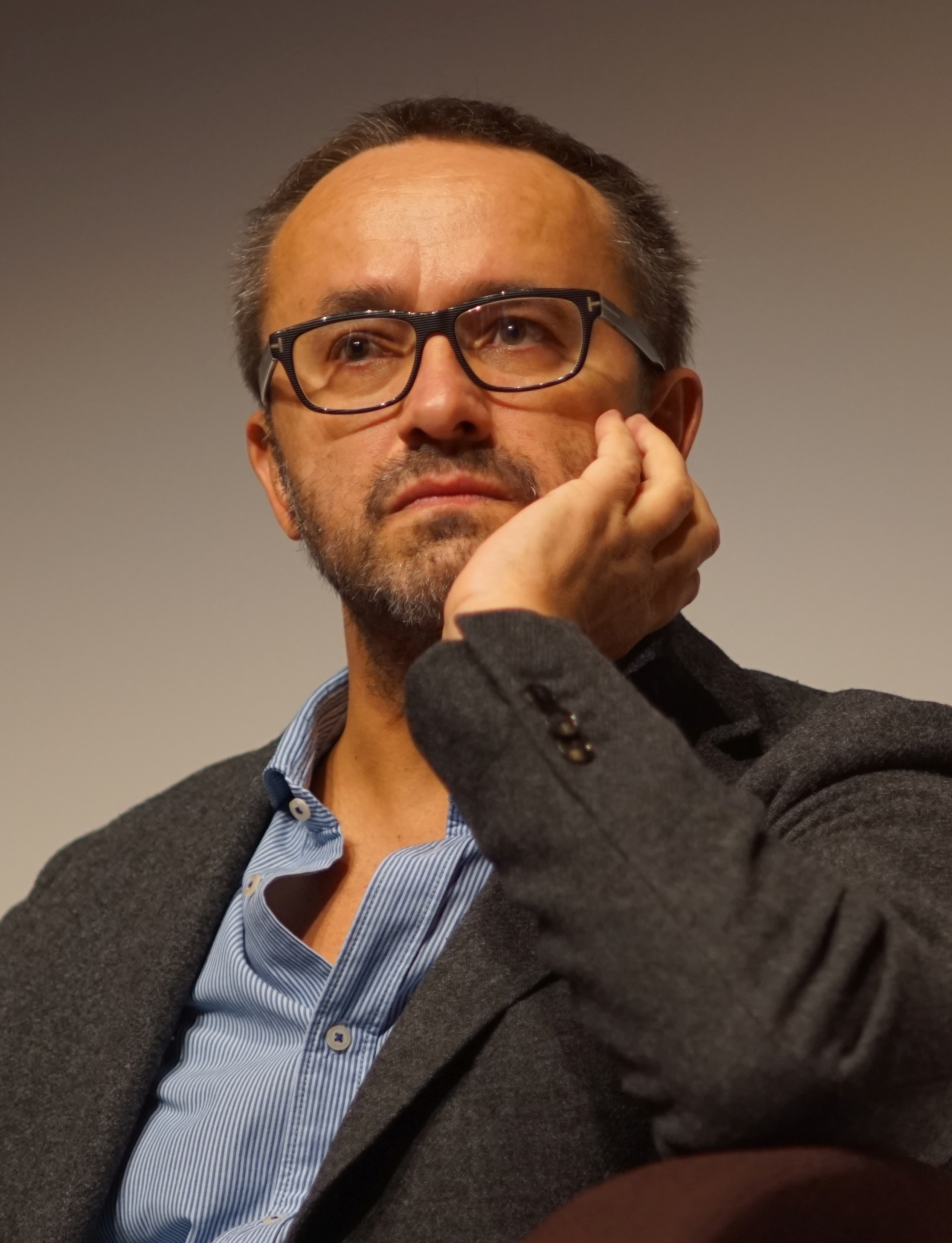 Andreï Zviaguintsev au festival de cinéma Premiers Plans d'Angers, en janvier 2016.